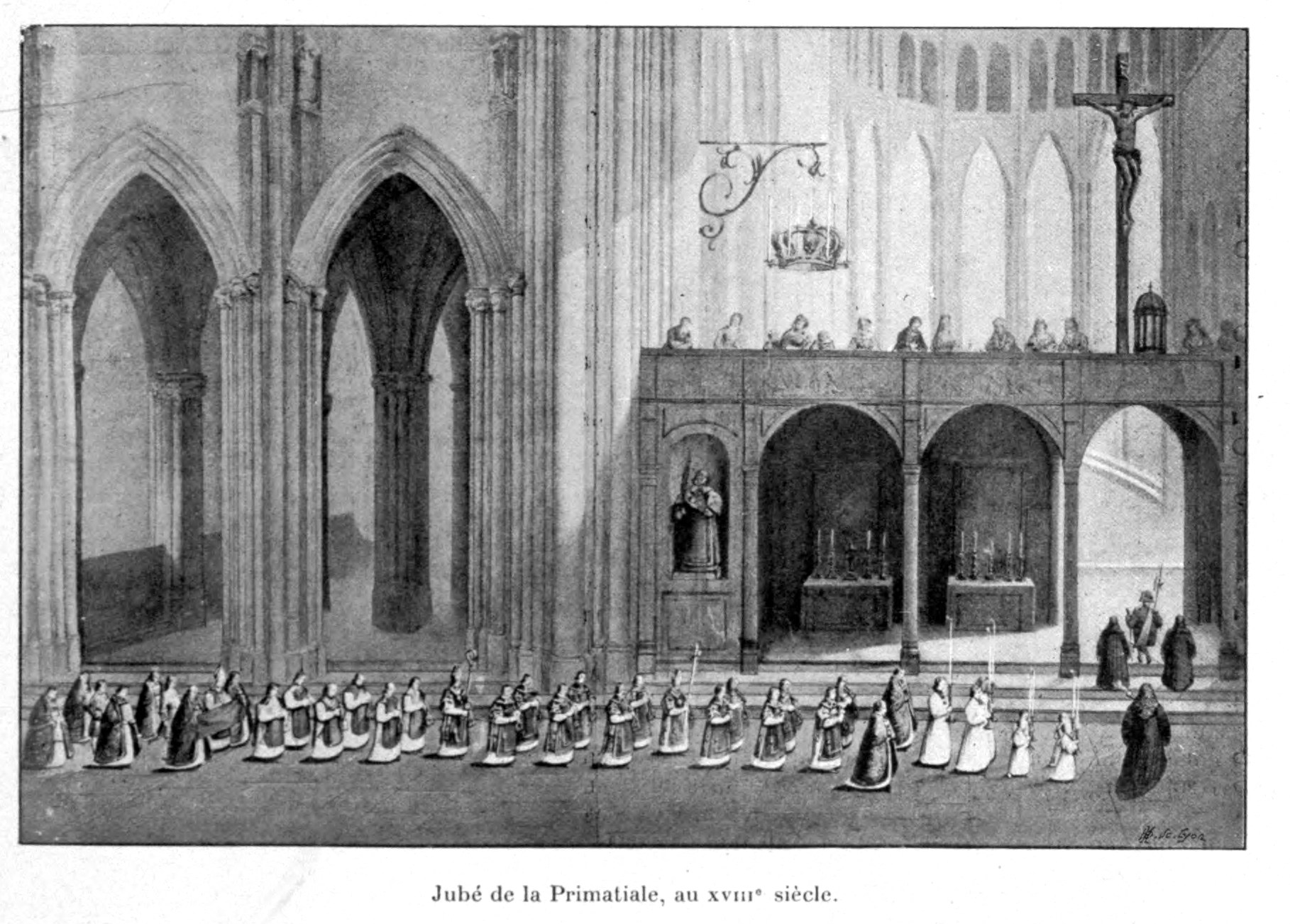 Illustrations pour l'Histoire des églises et chapelles de Lyon